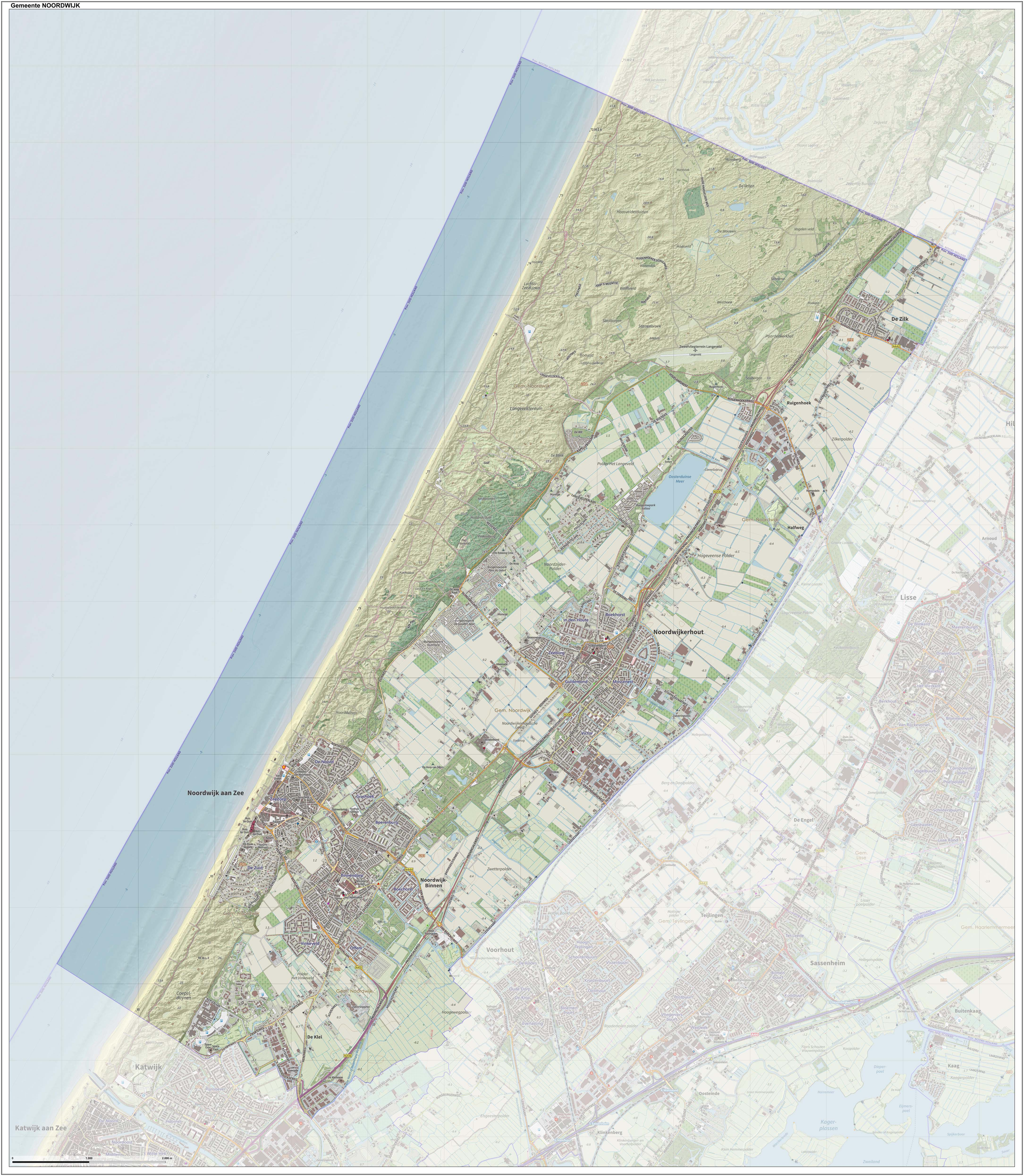 Topografische gemeentekaart. Resolutie: 400 pixels/km. Kaartbeeld samengesteld uit de open geodata van de Top10NL en Top25namen (Kadaster), Creative Commons-BY licentie. Gebouwvlakken uit open geodata BAG extract. Wegen uit de OpenStreetMap, OpenStreetMap community. Reliëfschaduw uit de Actuele Hoogtekaart AHN2. Samenstelling en kleurenschema: Jan-Willem van Aalst, met QGIS. Zie ook de Legenda.